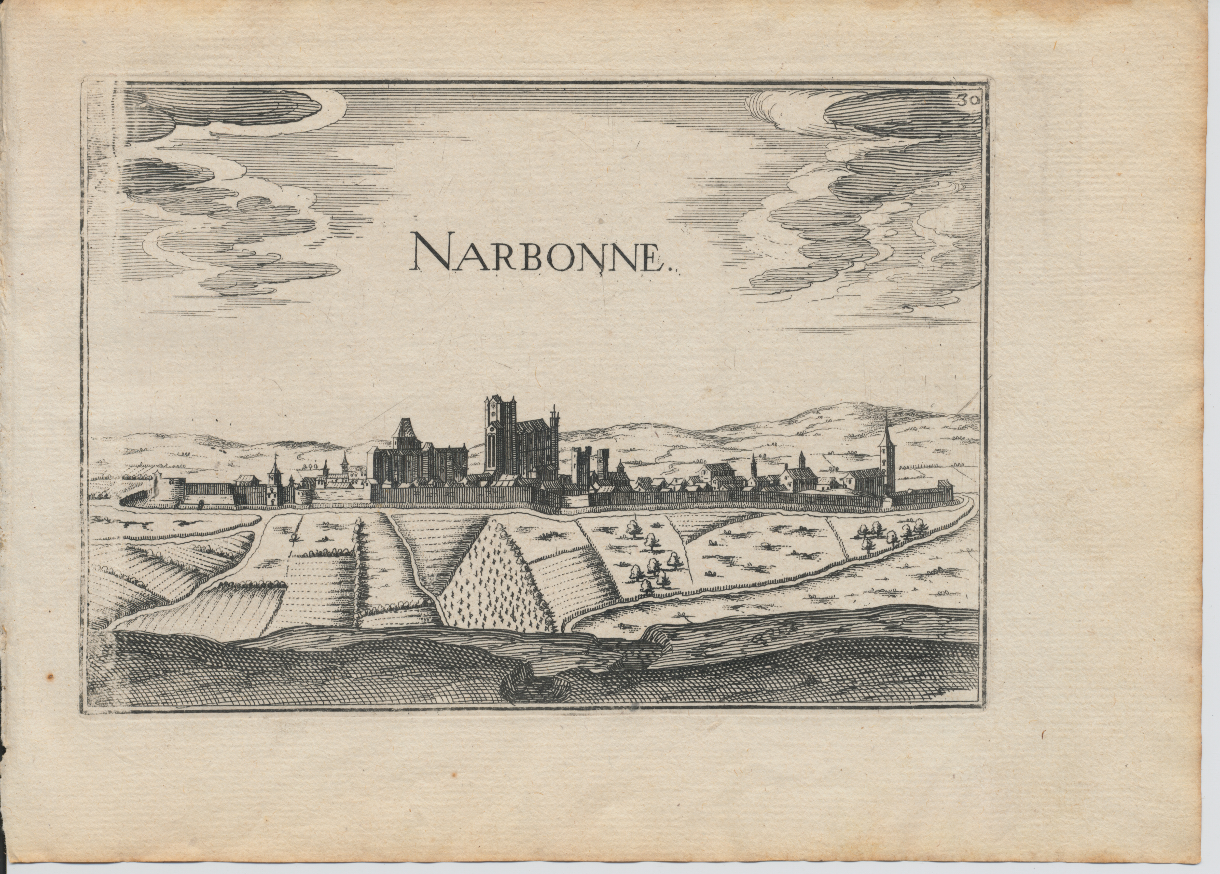 Gravure extraite de "Les Plans et Profils de toutes les principales villes et lieux considérables de France. par le Sieur TASSIN, géographe ordinaire de sa Majesté. A paris, Chez Melchior Tavernier, en l'Isle du Palais. 1634" (Province de Languedoc)